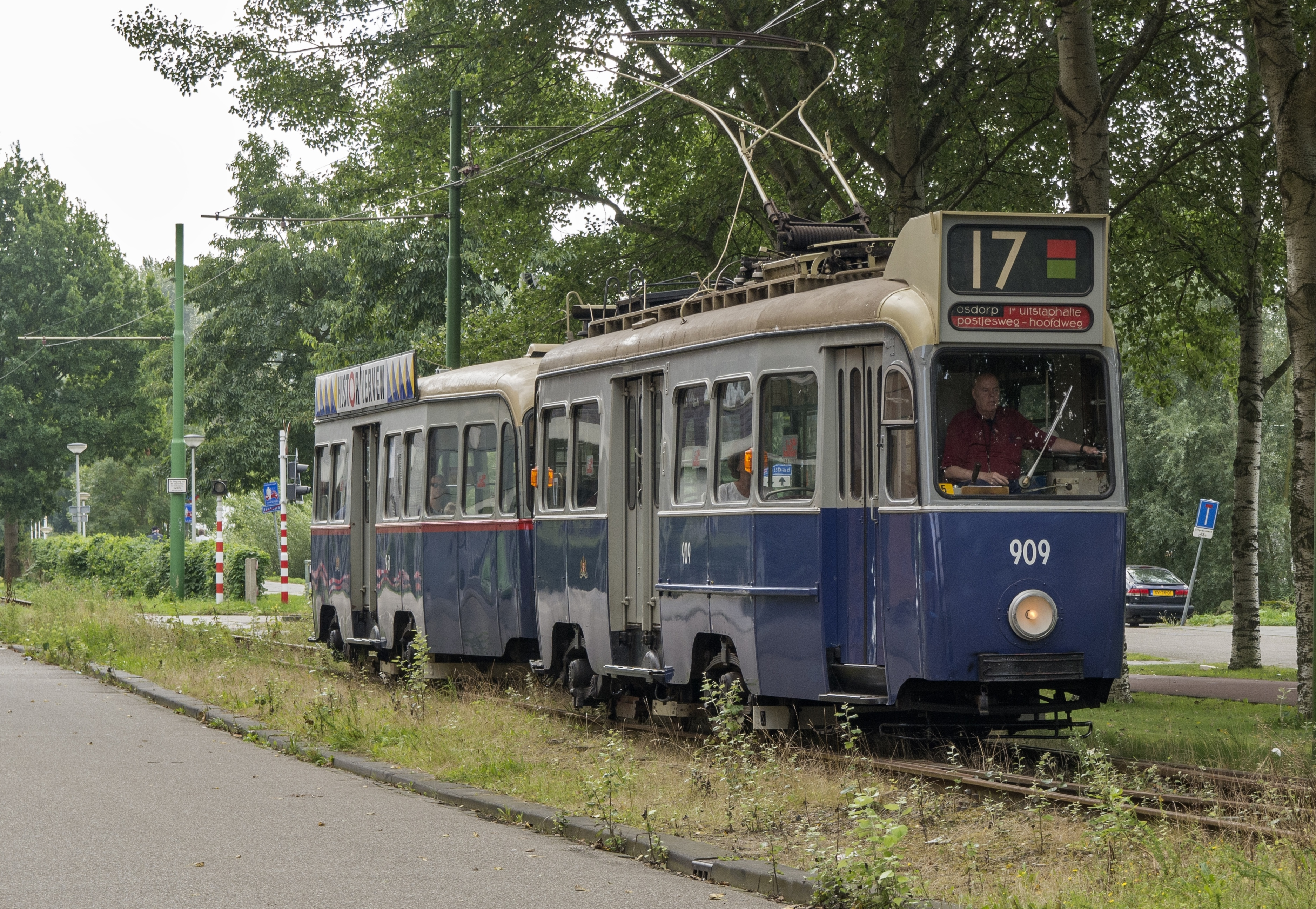 Op de eigen Amsterdamse Museumtramlijn rijdt Museumtram 909 uit de richting Amstelveen naar het Haarlemmermeerstation.